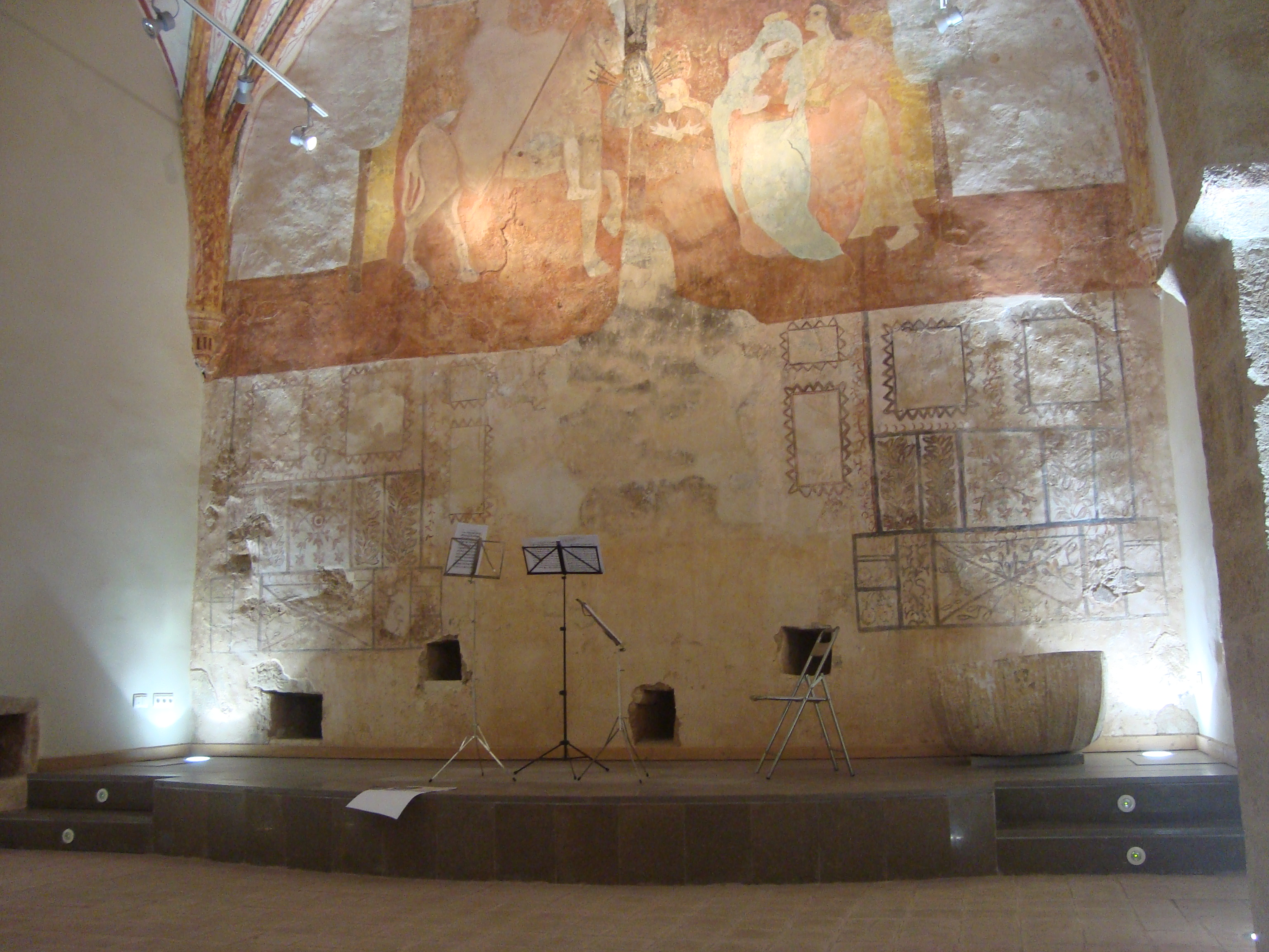 Interior de l'Esglèsia de Sant Francesc, temple medieval, Torreblanca, Castelló